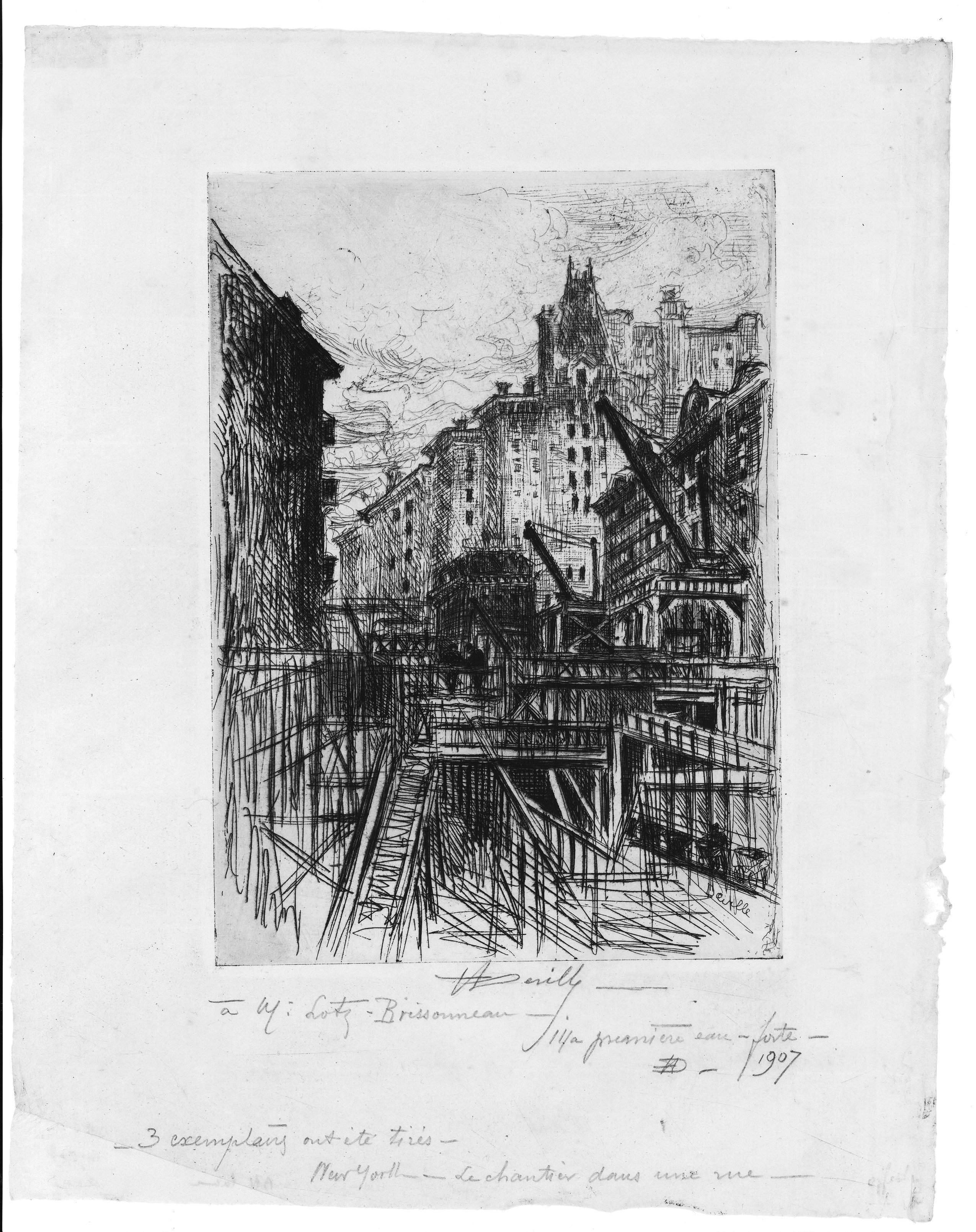 Vue d'un chantier sur State street à Manhattan, New-York. Oeuvre datée de 1907. Epreuve dédicacée au collectionneur nantais Alphonse Lotz-Brissoneau.